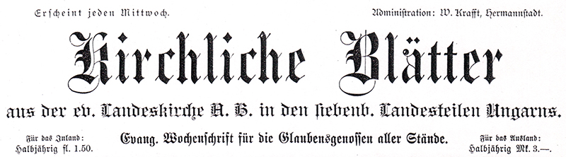 Ursprünglicher Zeitungskopf der Kirchlichen Blätter.